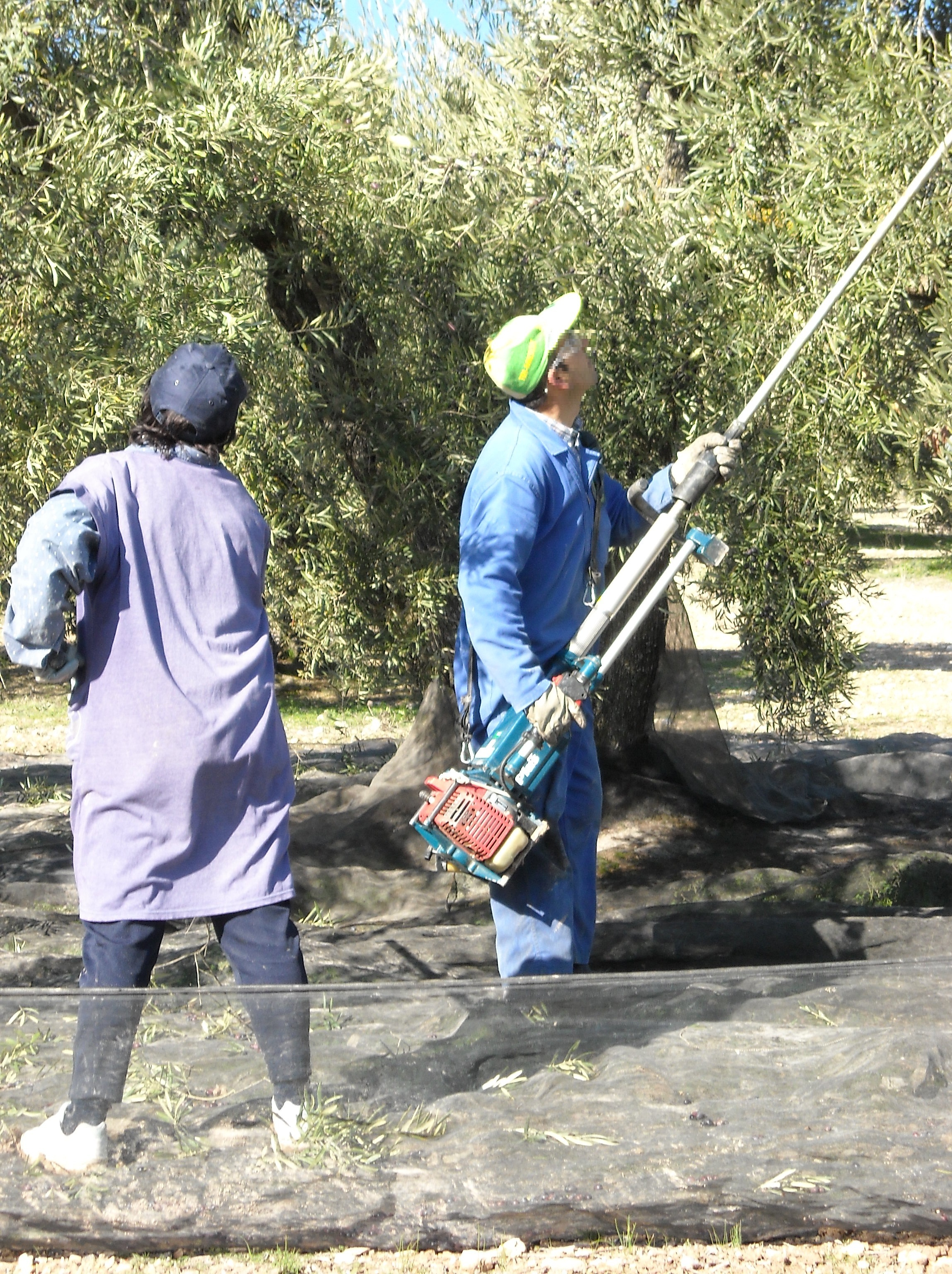 En la imagen pueden observarse dos agricultores en la recogida de la aceituna